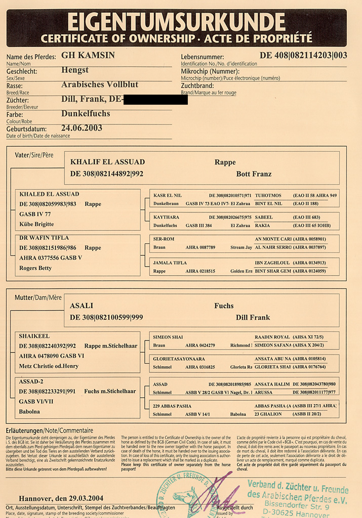 Eigentumsurkunde von GH KAMSIN